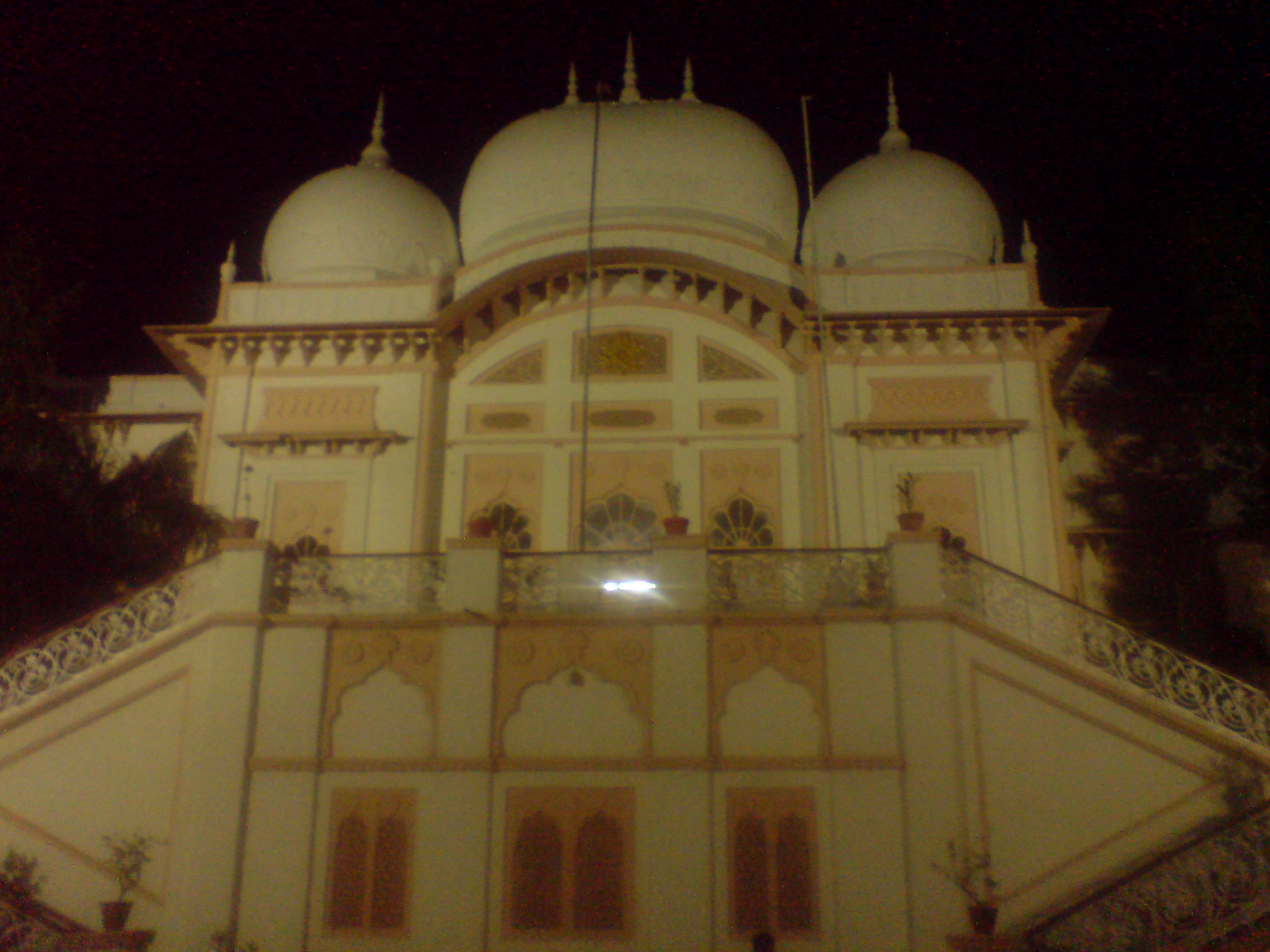 Kothi, Vikramaditya bhawan